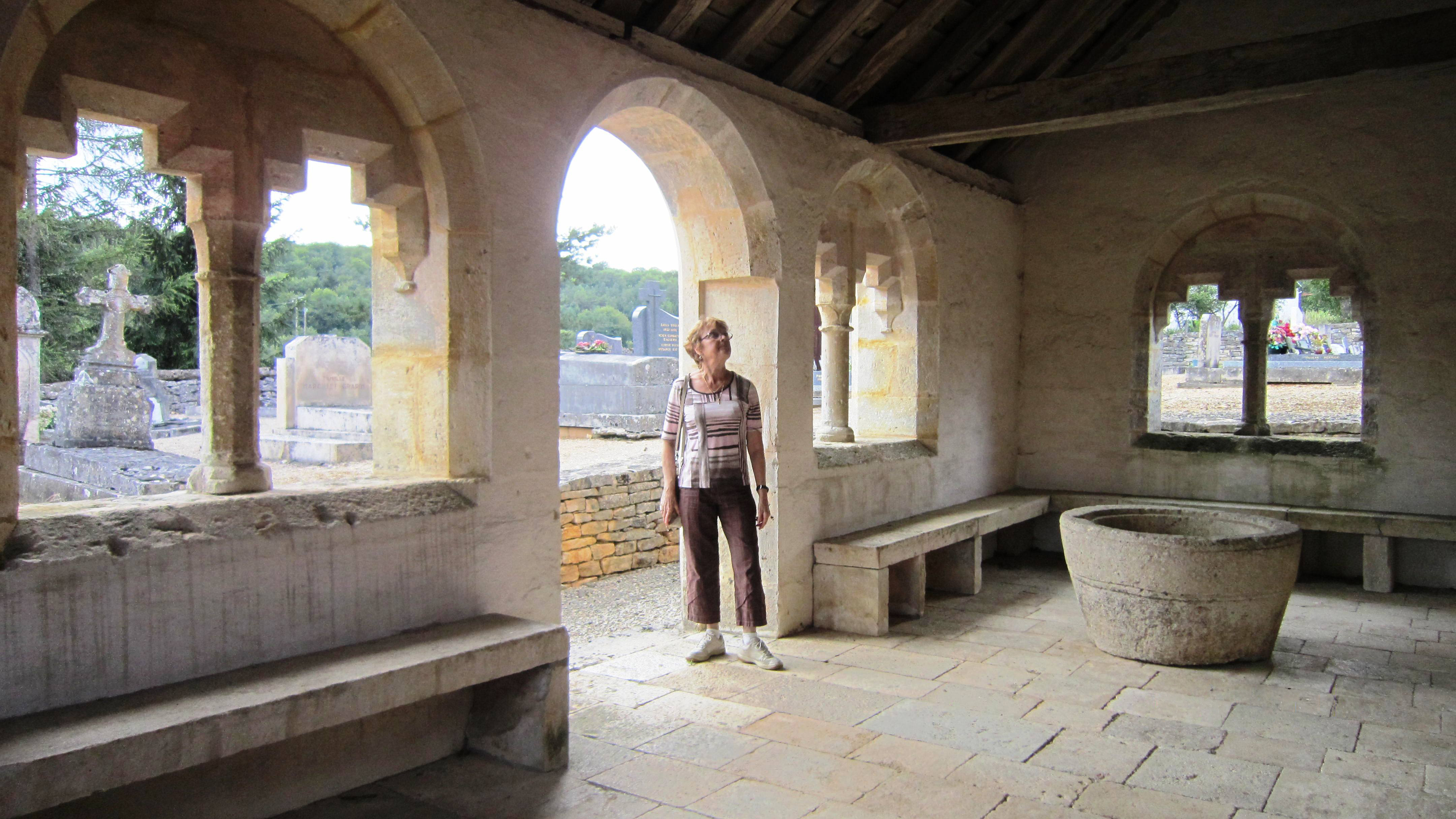 Porche de l'église de Terrefondrée (Côte-d'Or, Bourgogne, France).